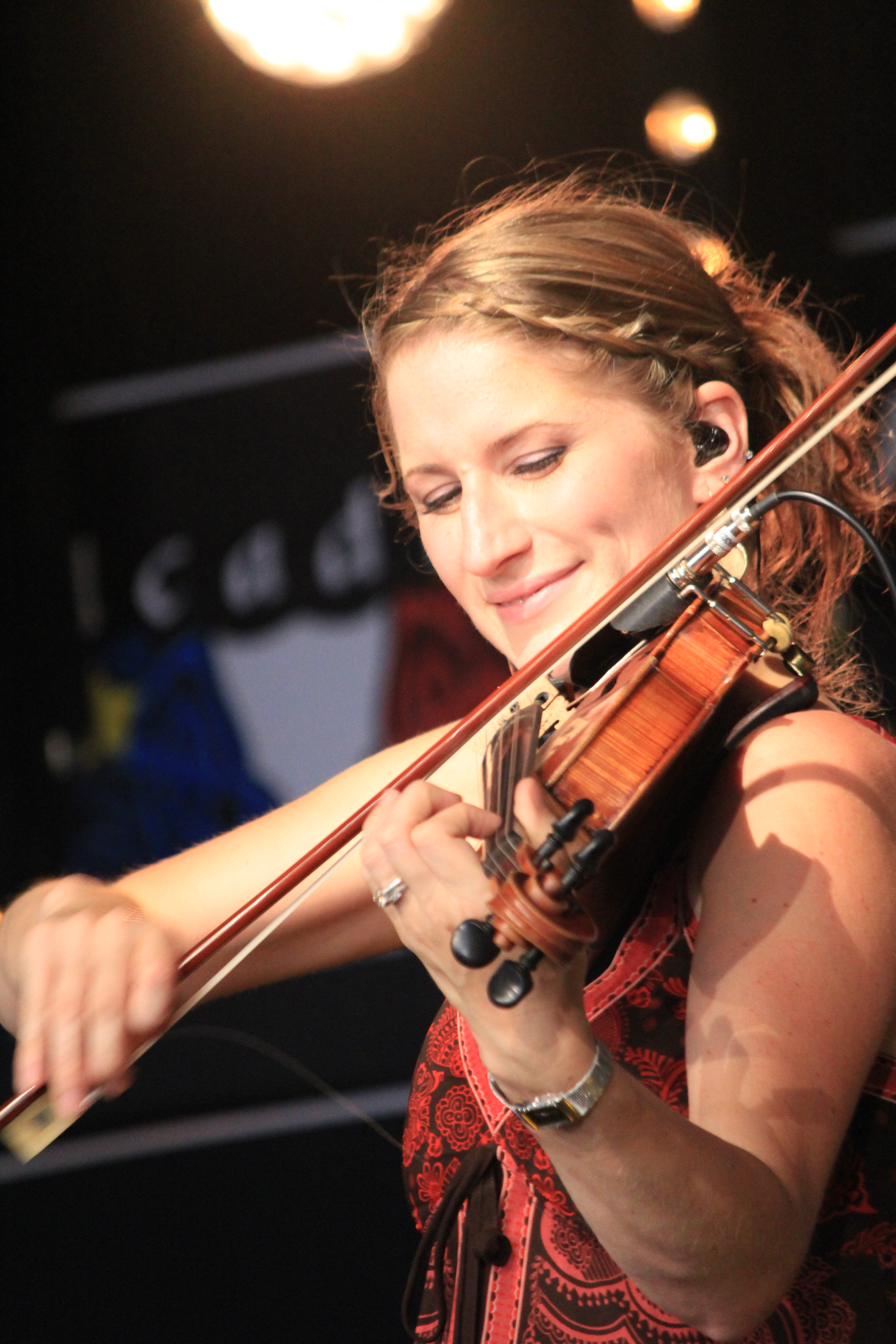 Dominique Dupuis lors d'un concert organisée dans le cadre du festival interceltique de Lorient 2012.